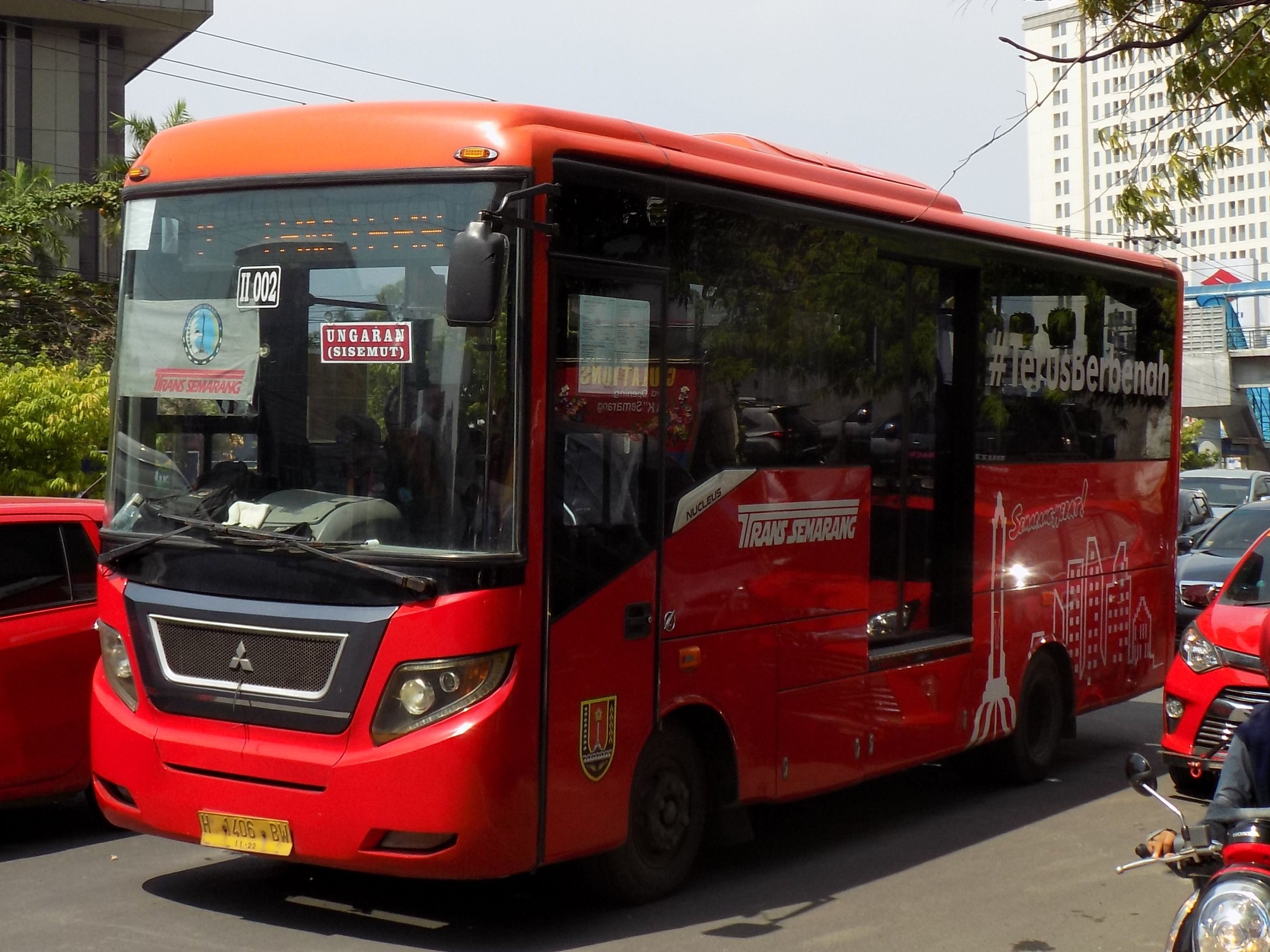 Koridor 2 - Nucleus Trans Semarang Operated by PT Surya Setia Kusuma Semarang